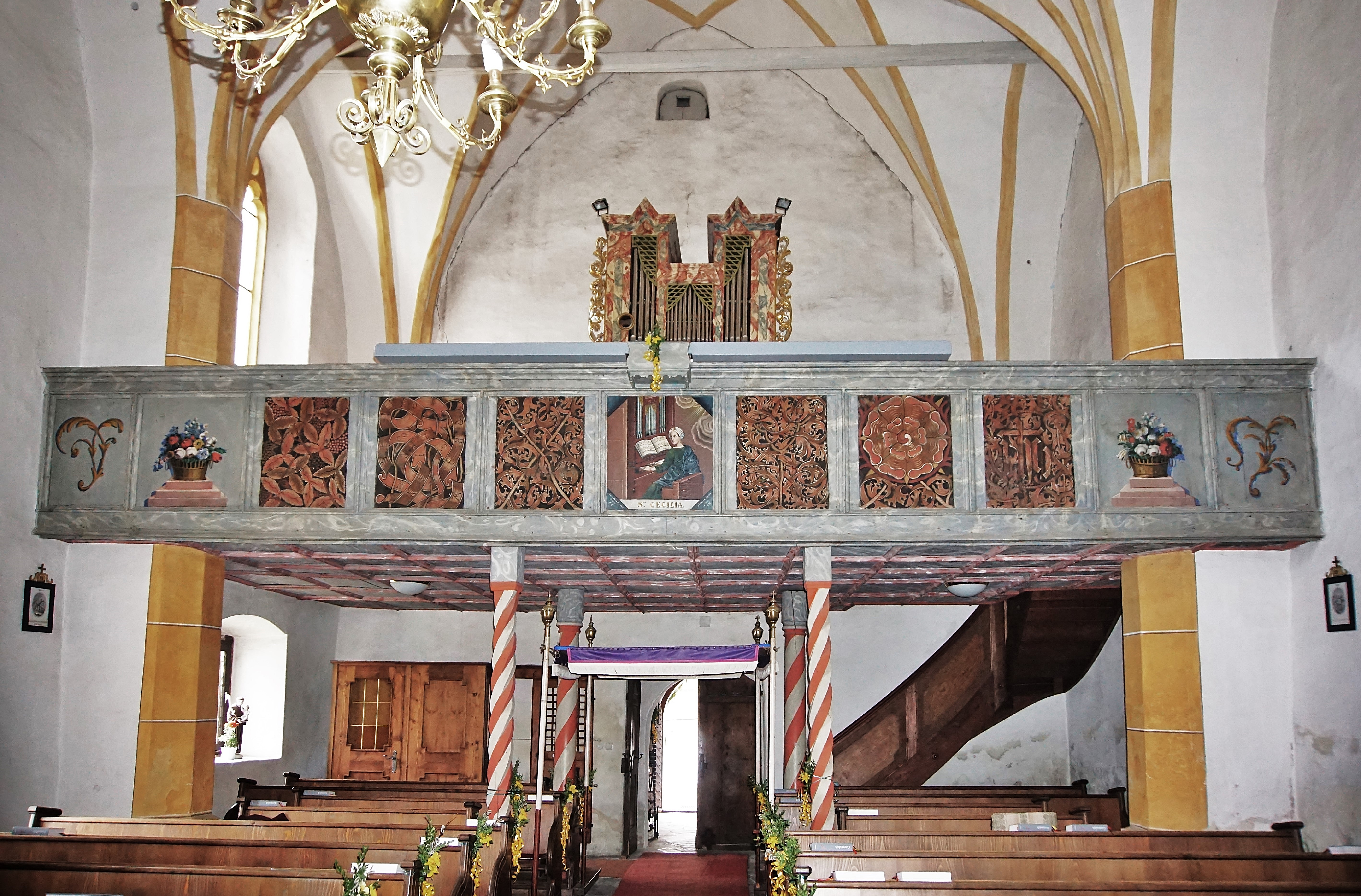 Kath. Pfarrkirche Hl. Margaretha (Ebene Reichenau), Blick zur Empore